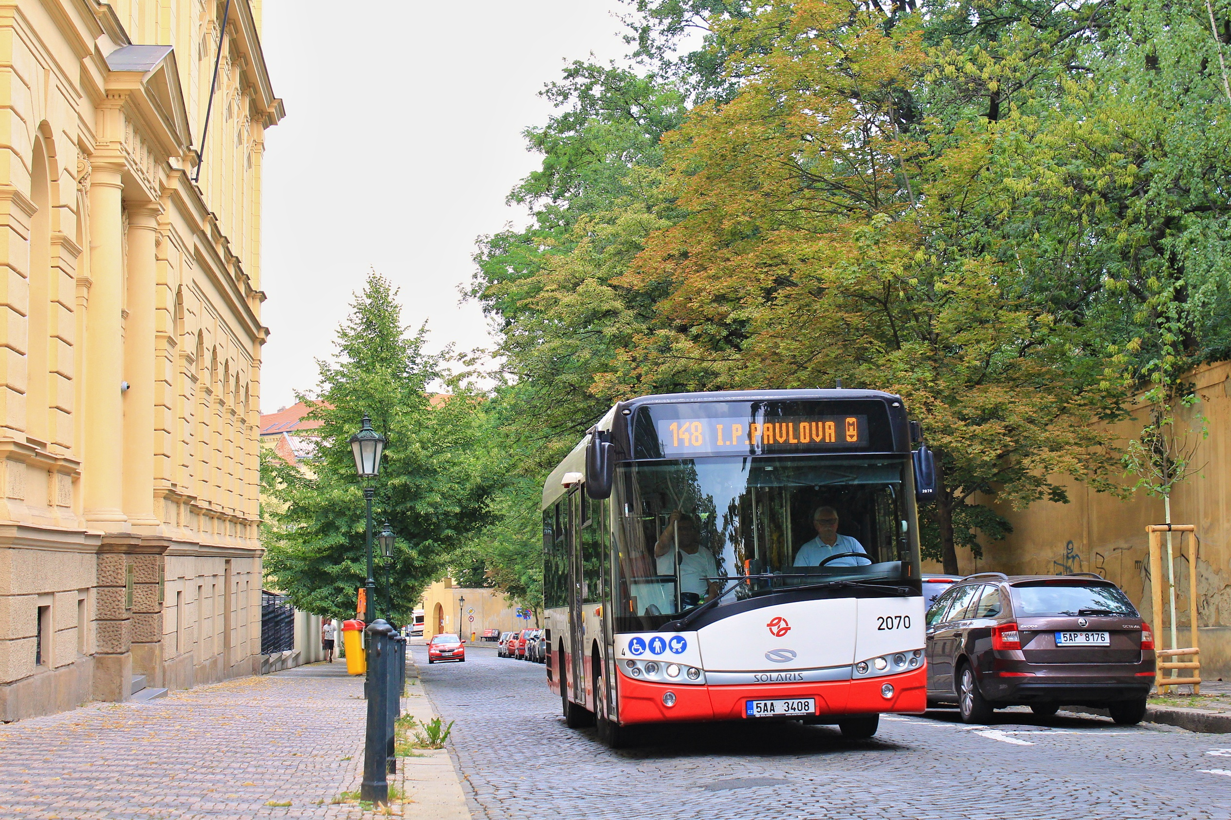 Solaris Urbino 8,9, linka 148 v Praze, Karlov